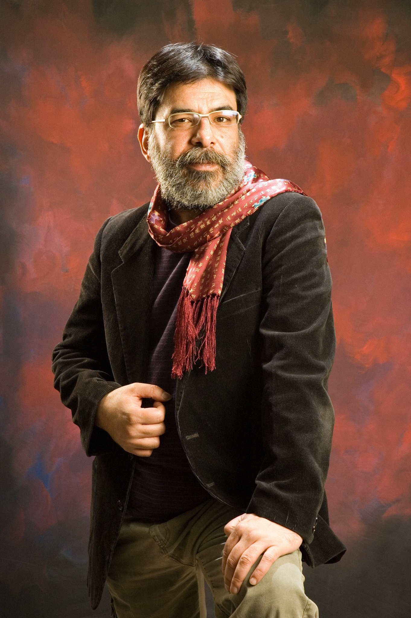 محمد رضا علیقلی